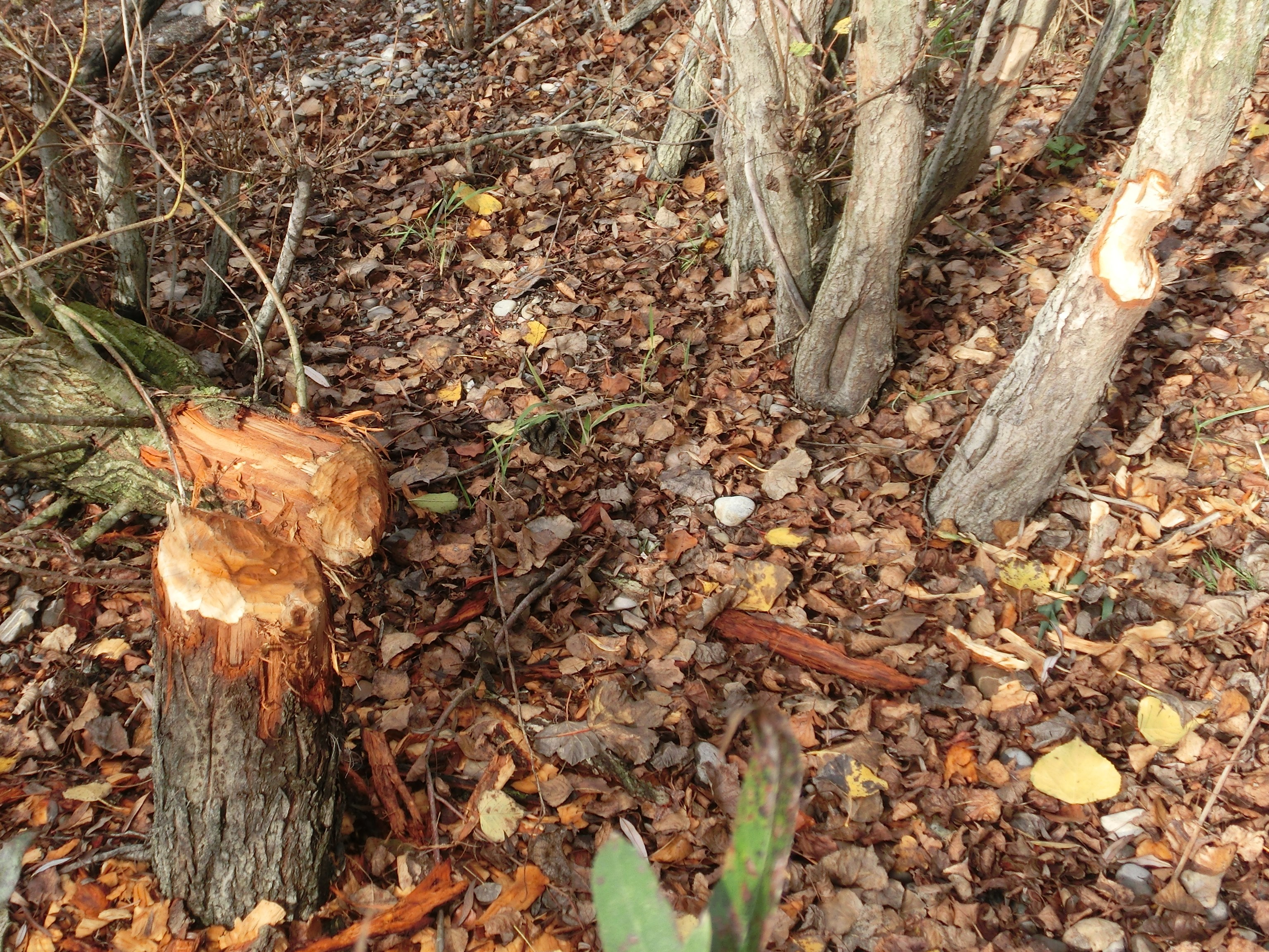 Deutschland - Baden-Württemberg - Bodenseekreis - Kressbronn am Bodensee: Fressspuren eines Bibers bei der Argenmündung